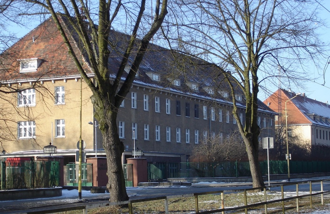 Koszary WOP w Szczecinie przy Żołnierskiej; budynek nr 1: stacjonowały tu min. sztab 12 Brygady WOP, kompania wartownicza, kompania łączności